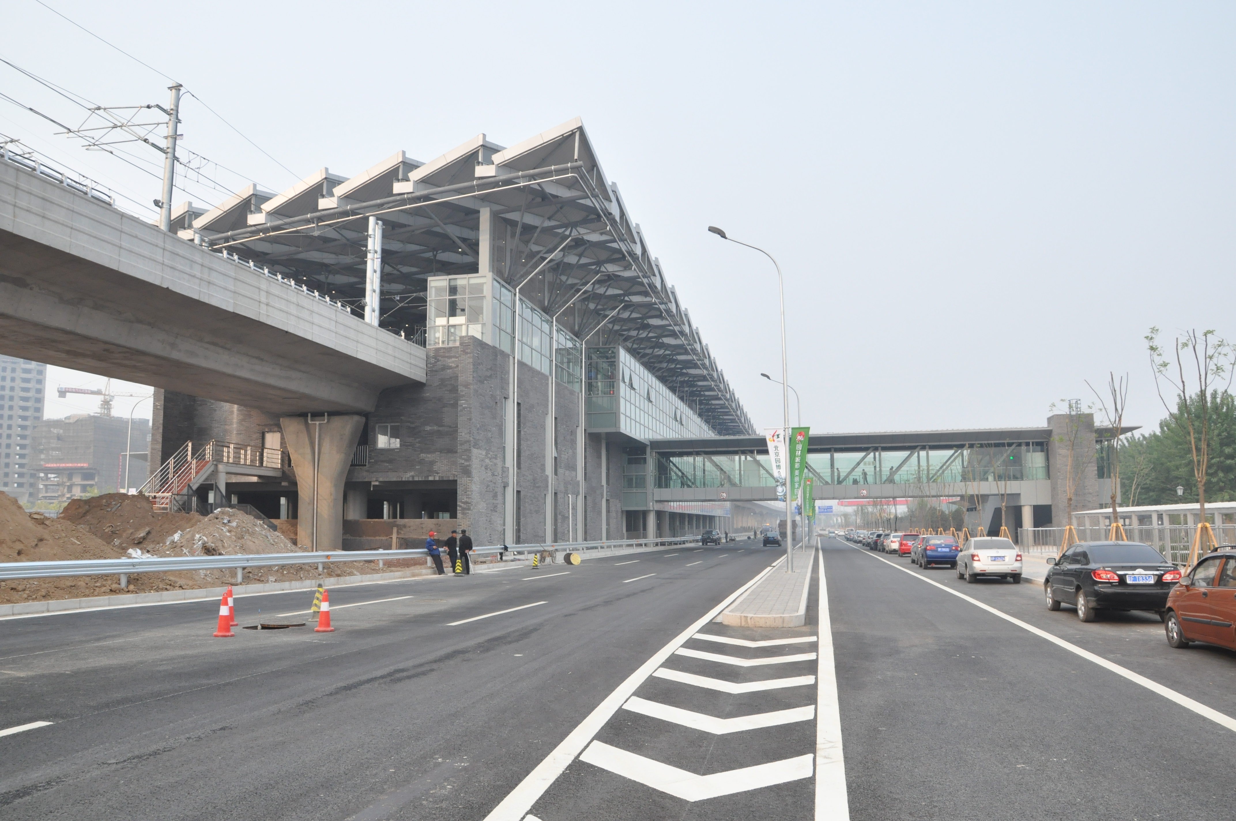 北京地铁14号线张郭庄站。